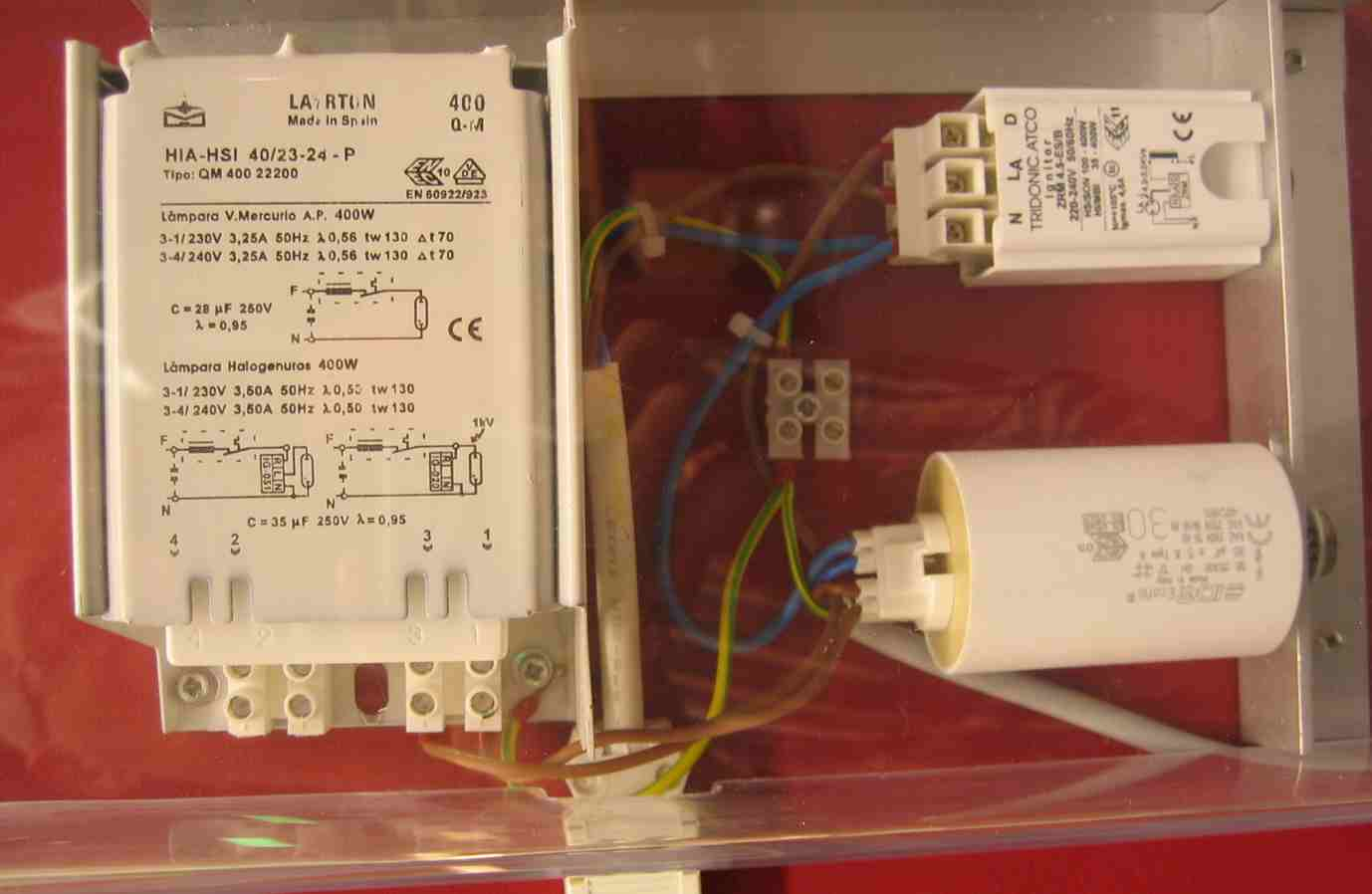 Voorschakelapparaatuur voor 400 W metaalhalidelamp. Zelf gefotografeerd.